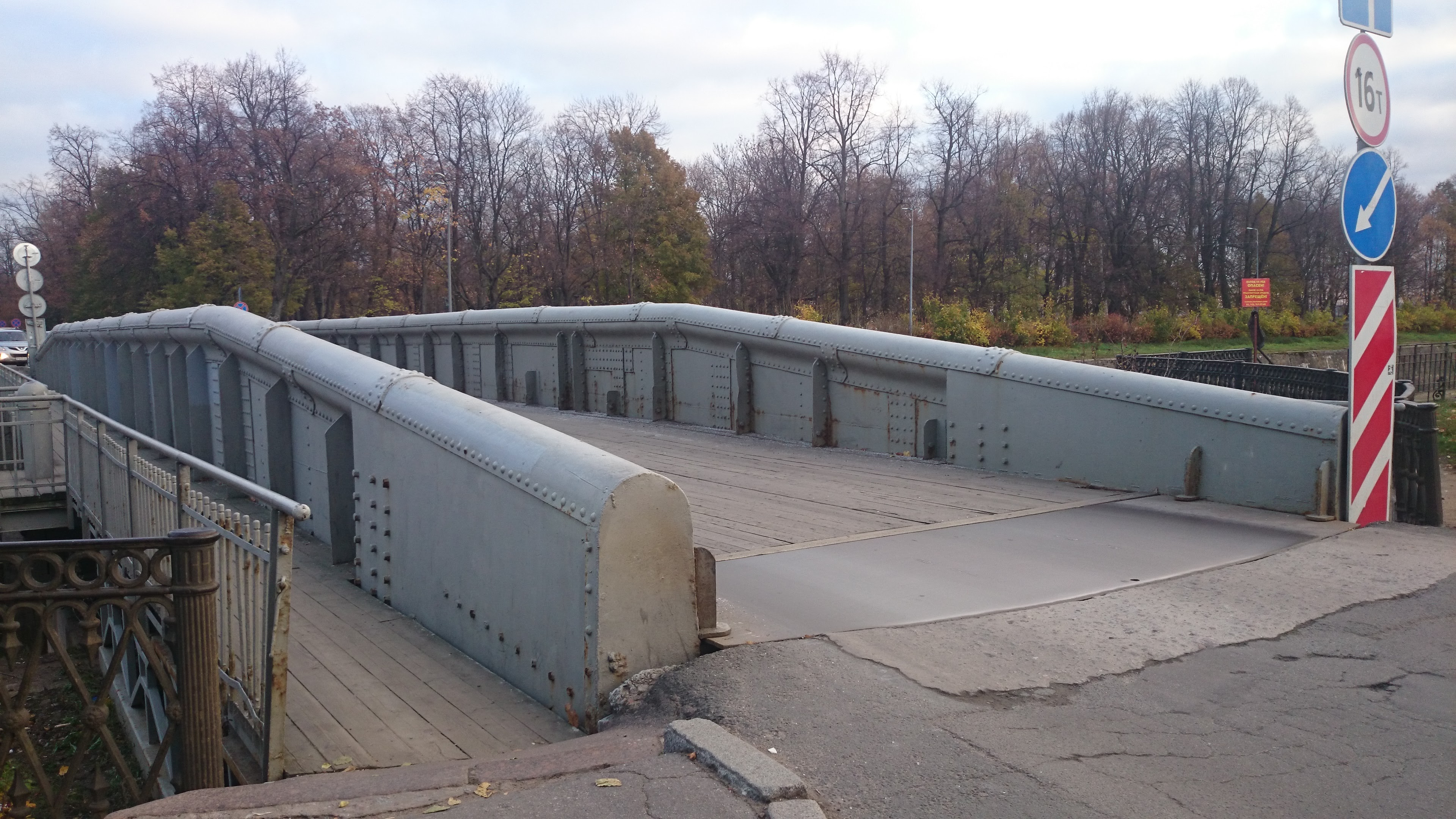 Kronshtadt, Saint Petersburg, Russia